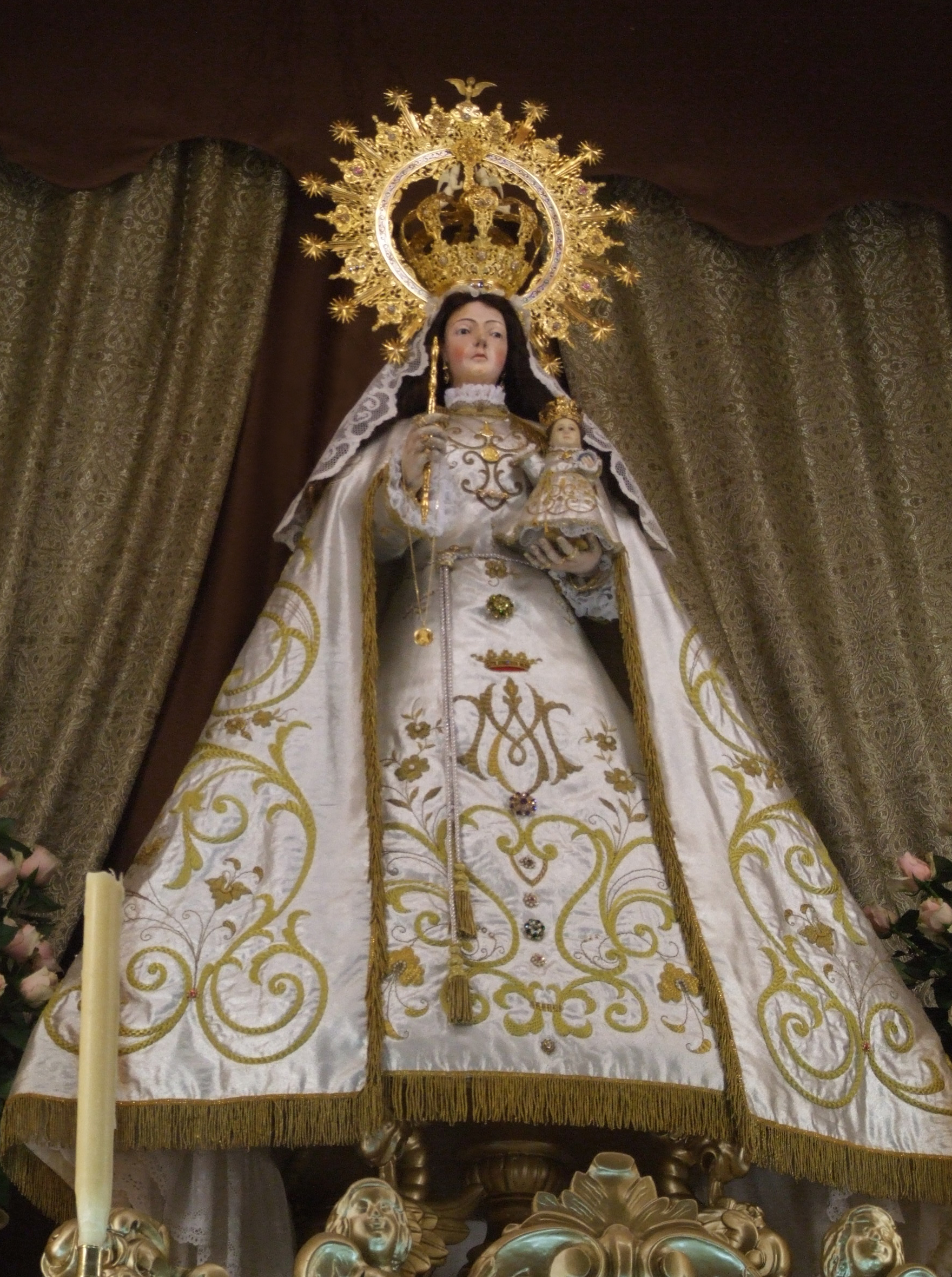 La imagen de Nuestra Señora del Monte en el altar de la Ermita Grande en la romería del año 2011